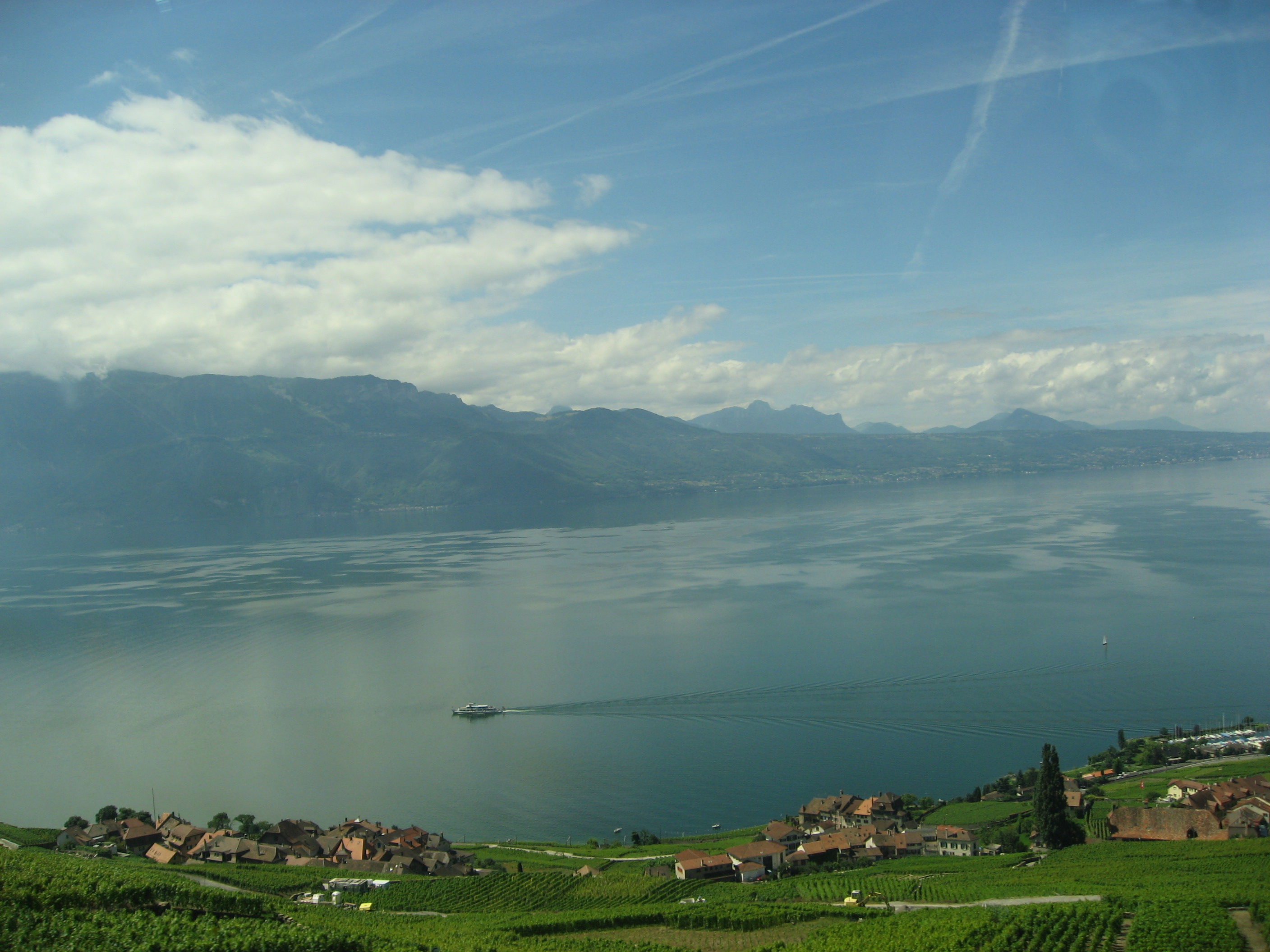 Vue du Lavaux et du lac Léman depuis le train